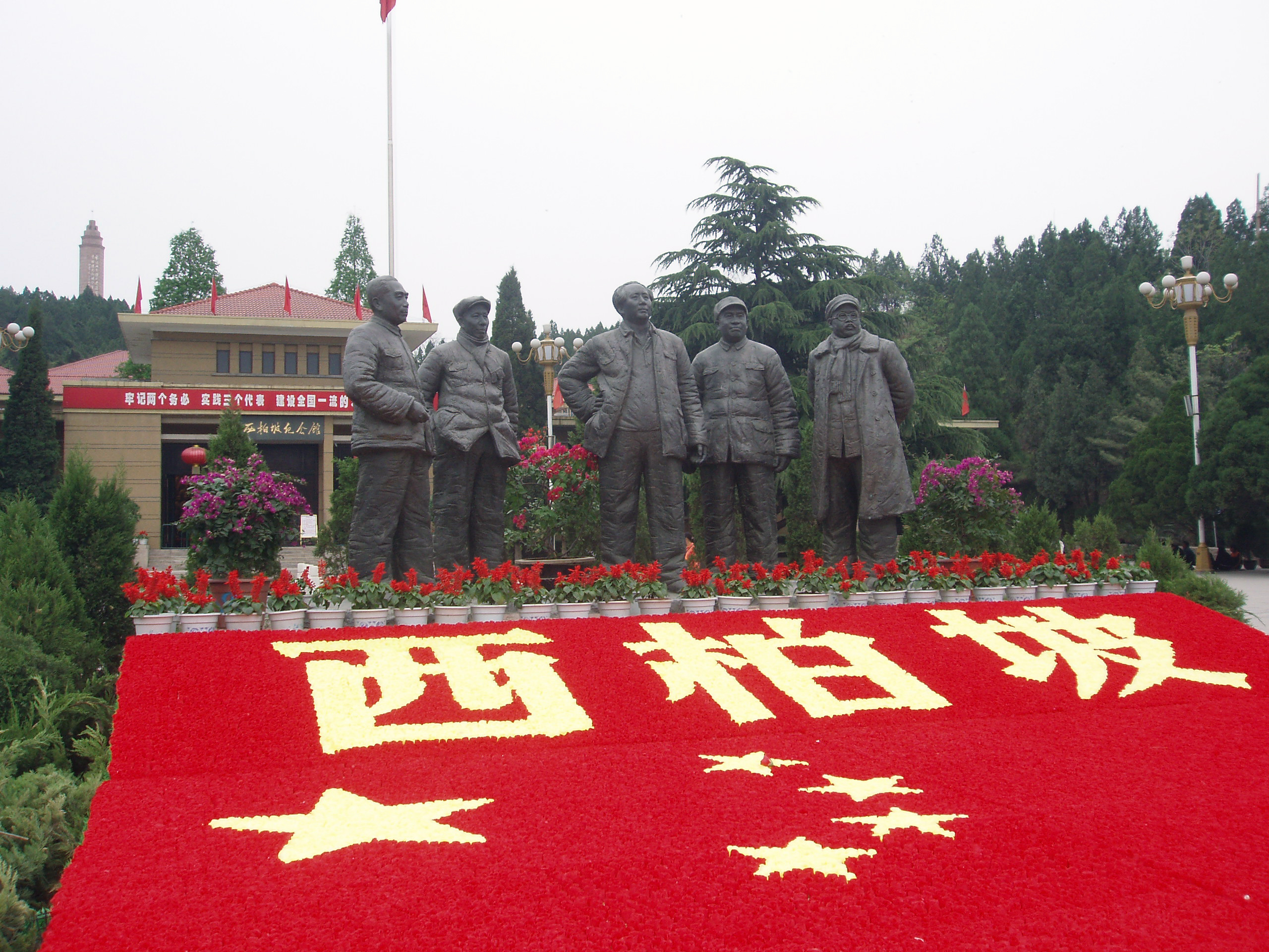 Statues of Mao Zedong,Zhou Enlai et al in Xibaipuo Museum, Shijiazhuang,China